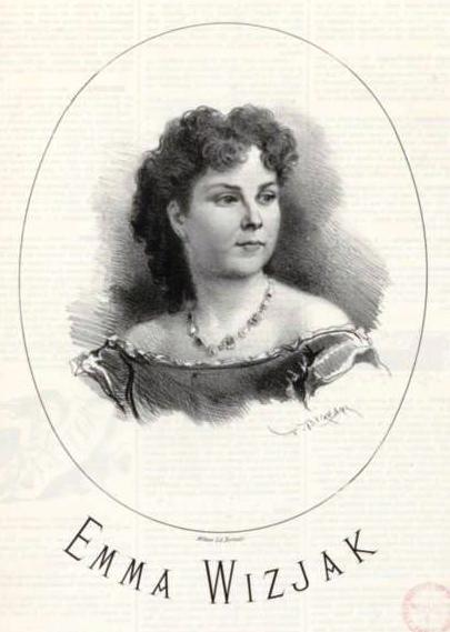 Emma Wizjak (1847-1913)